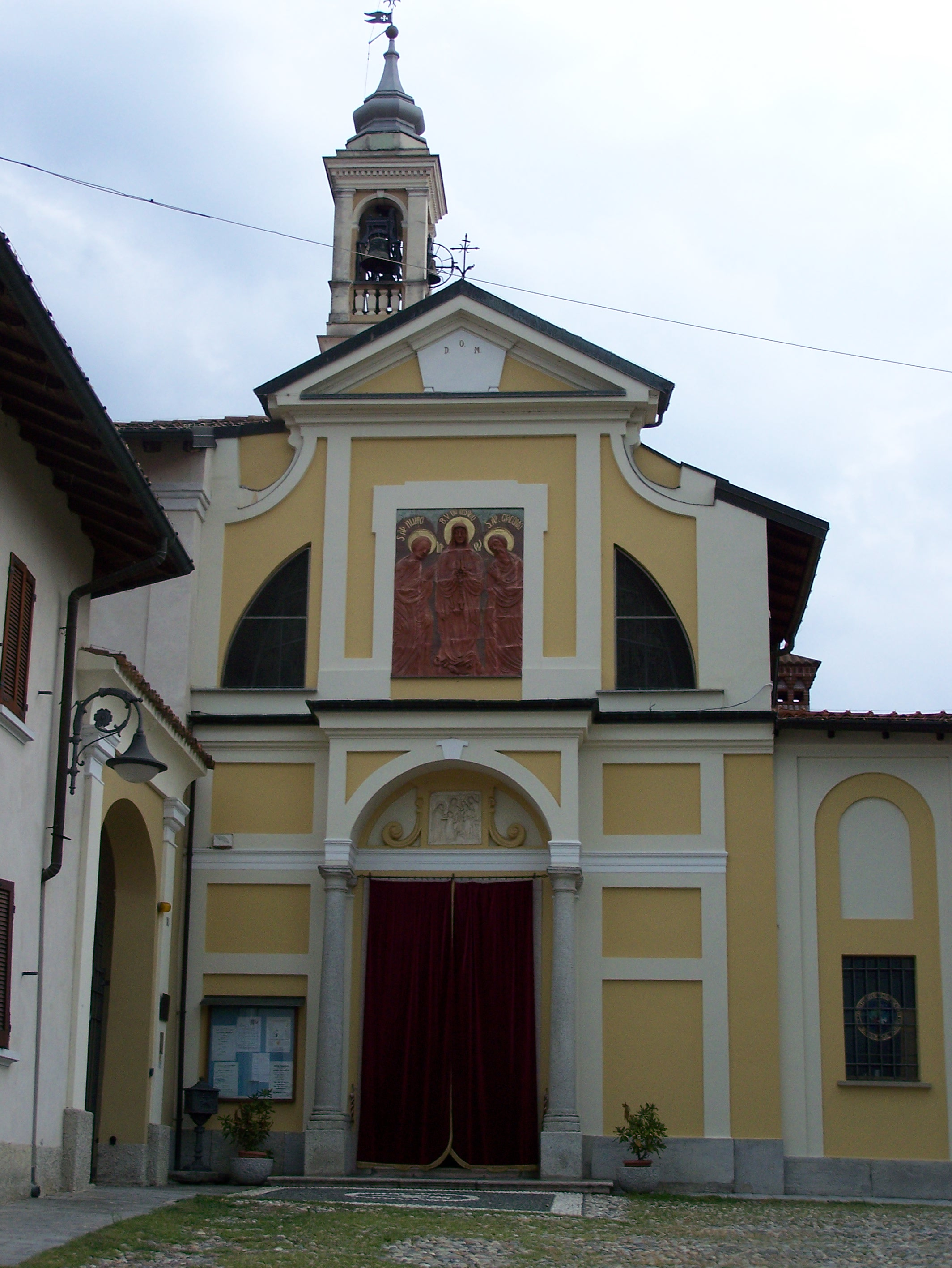 La Chiesa dei Santi Filippo e Giacomo a Castelletto di Cuggiono (MI) - Italy